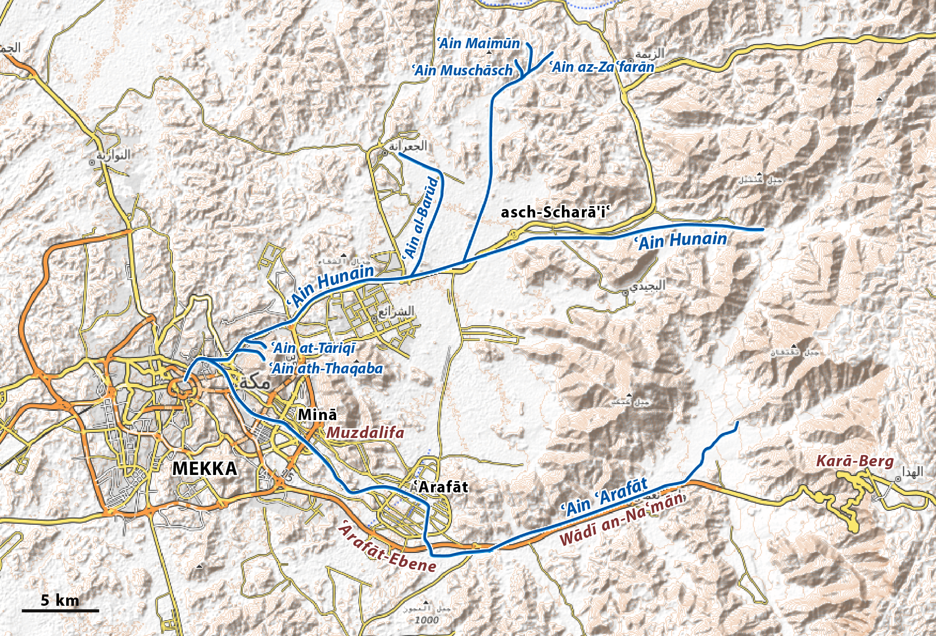 Karte der Wasserleitungen von Mekka im 19. Jahrhundert